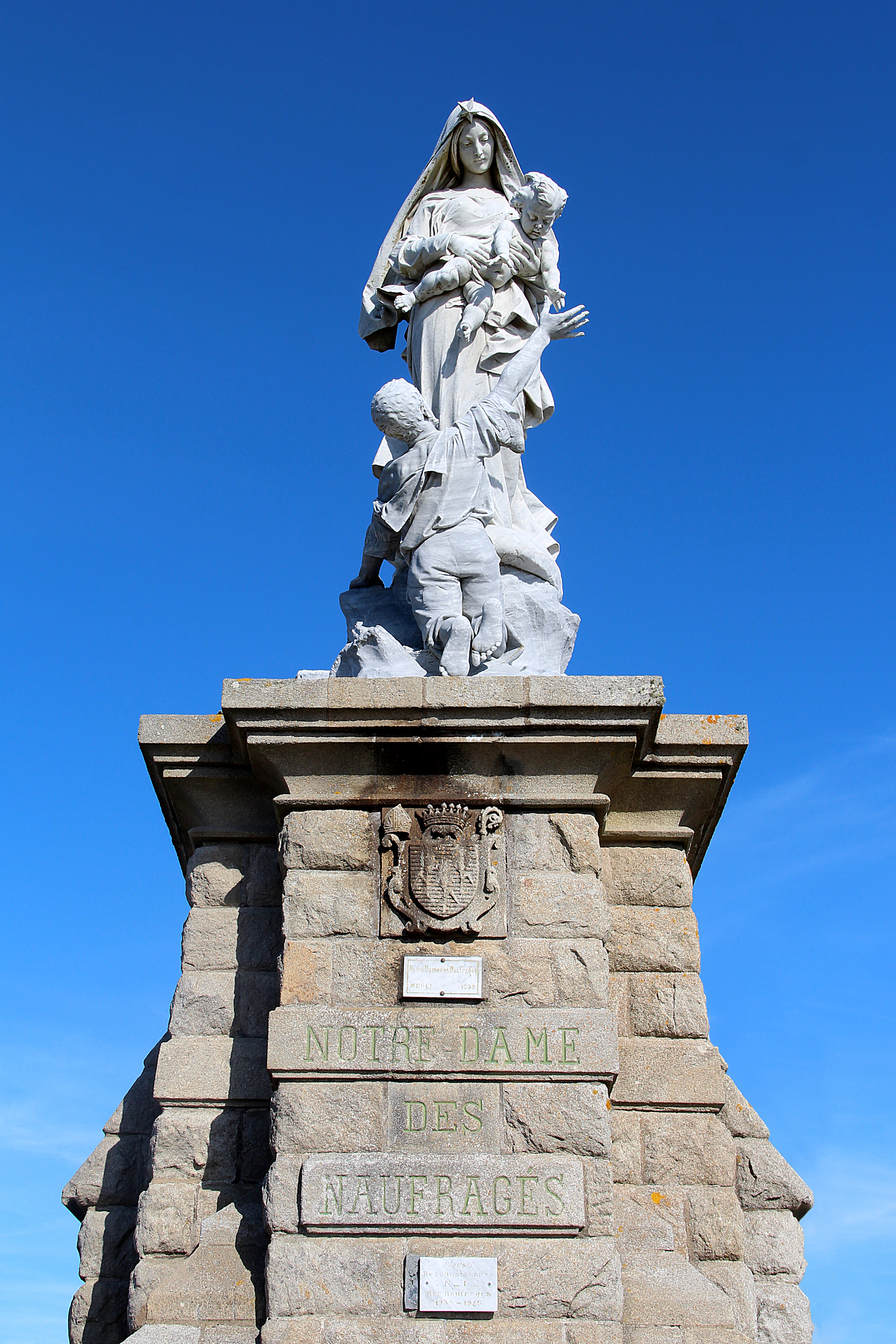 Statue de Notre-Dame des Naufragés de Cyprian Godebski érigée à l’extrémité du plateau sommital de la Pointe du Raz à Plogoff (Finistère, France).